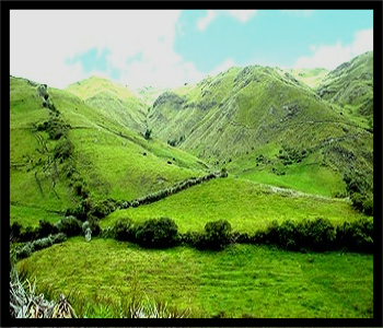 Un hermoso paisaje lleno de vegetacíon